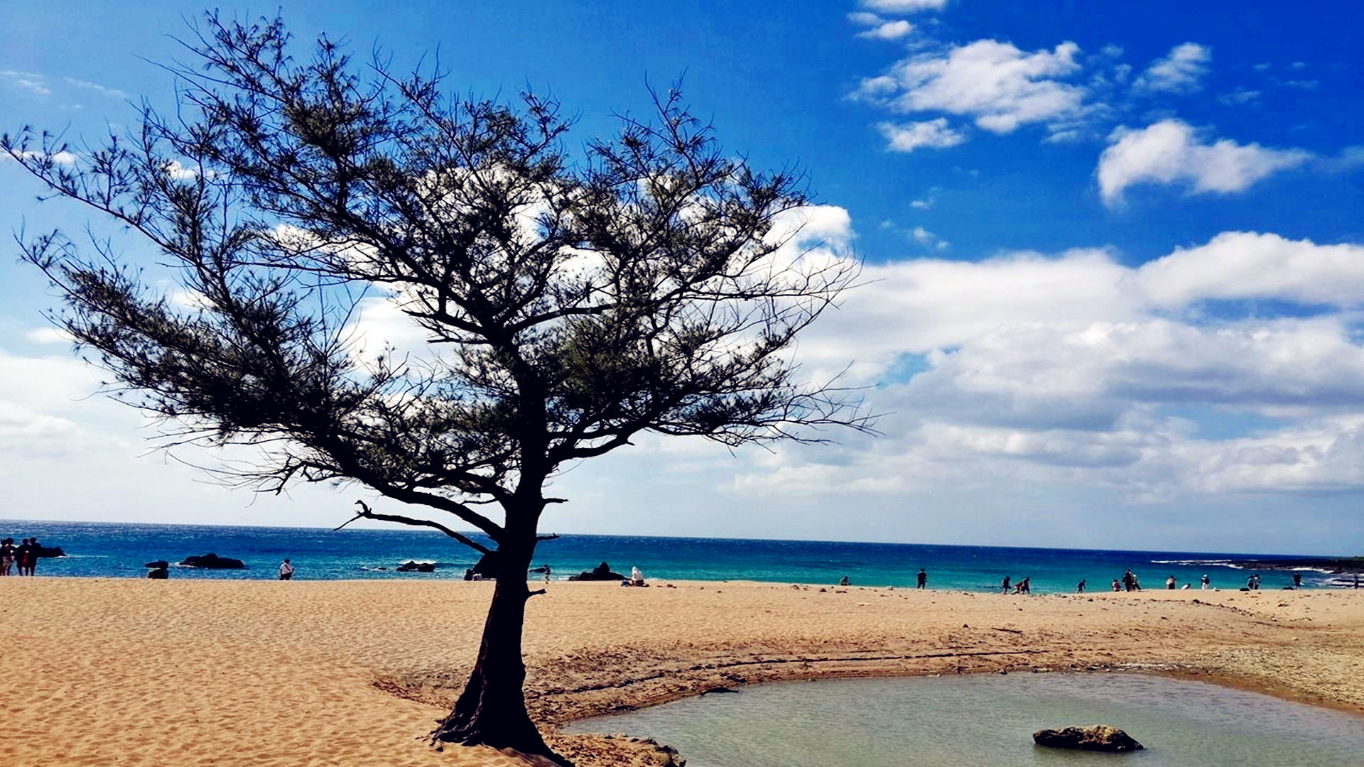 藍天白雲下的船帆石沙灘景色優美，是到墾丁的遊客最喜愛的戲水聖地。